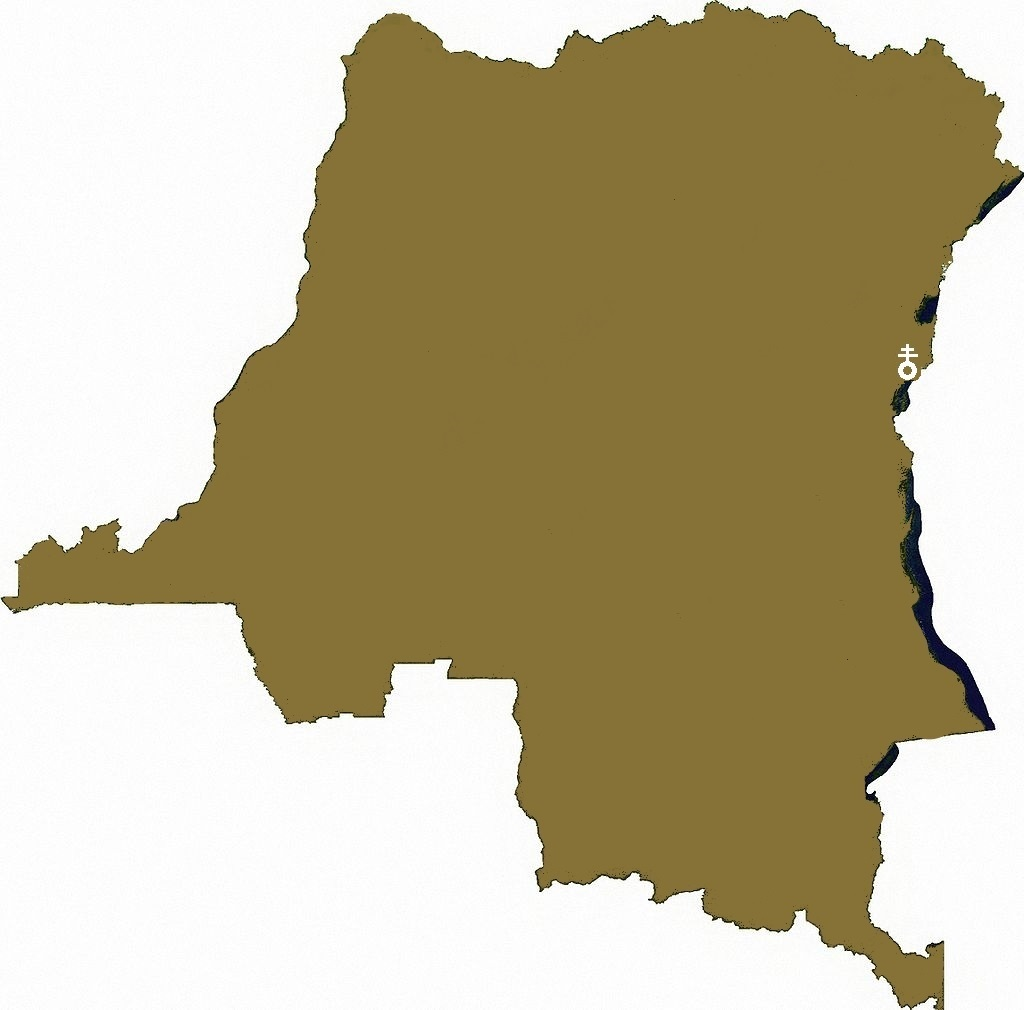 kaart congo